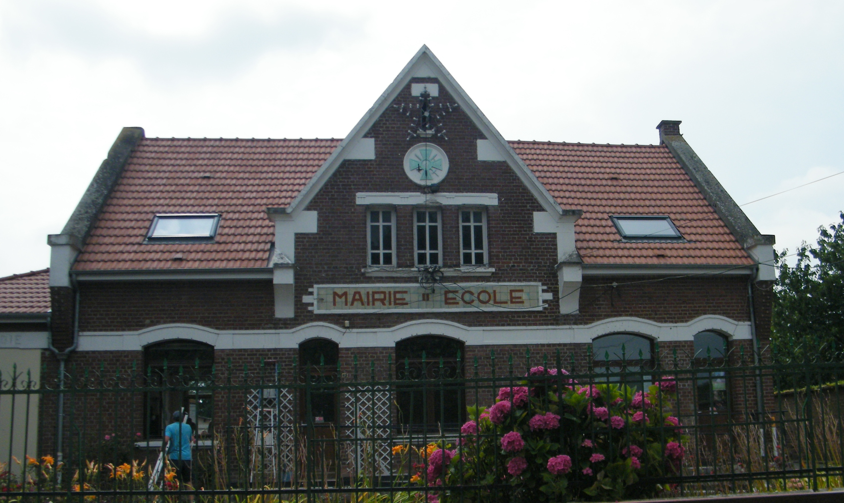 Mairie-école de Lihons, avec croix de guerre en fronton.